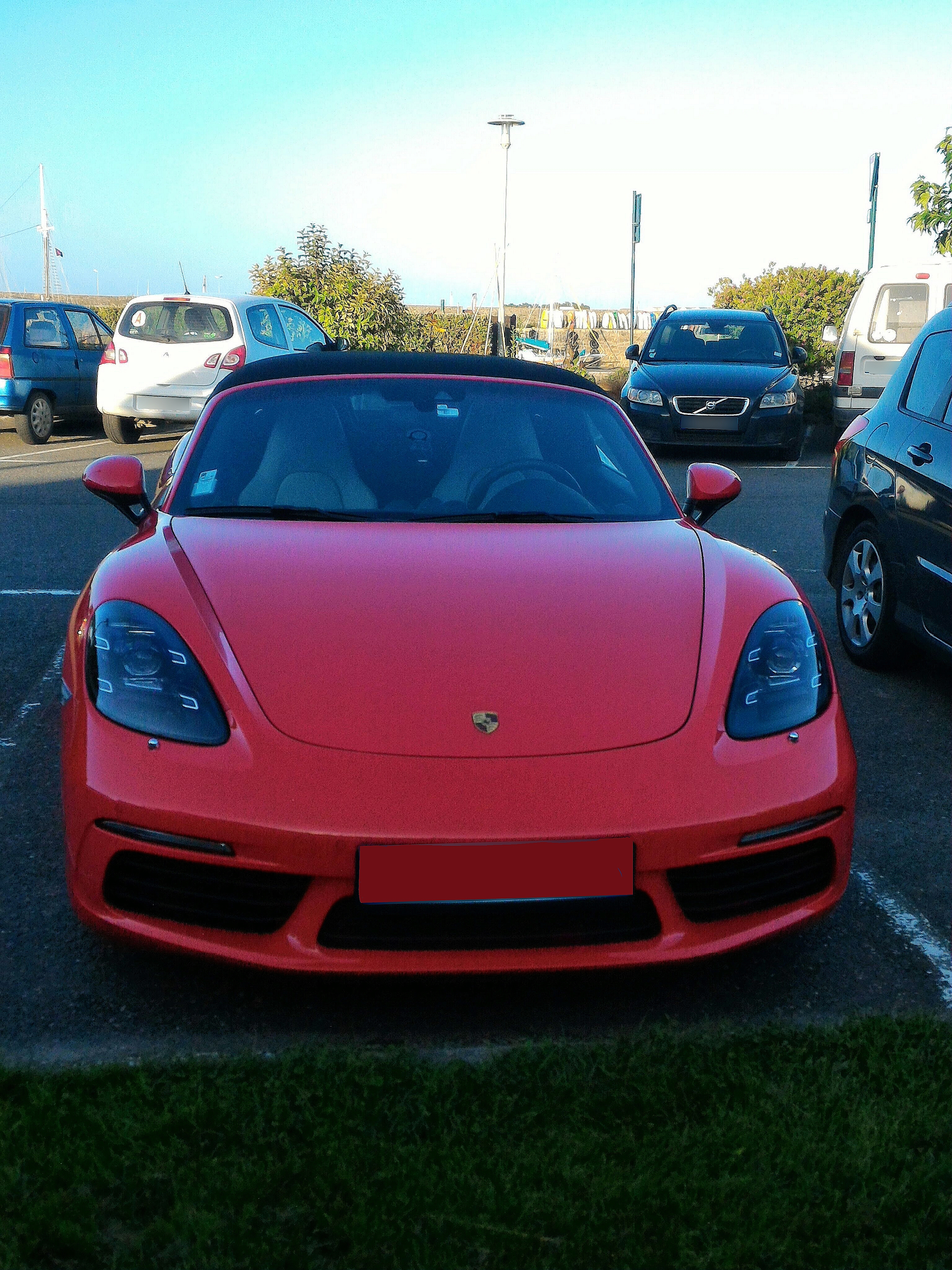 Porsche 718 Boxster S - face avant